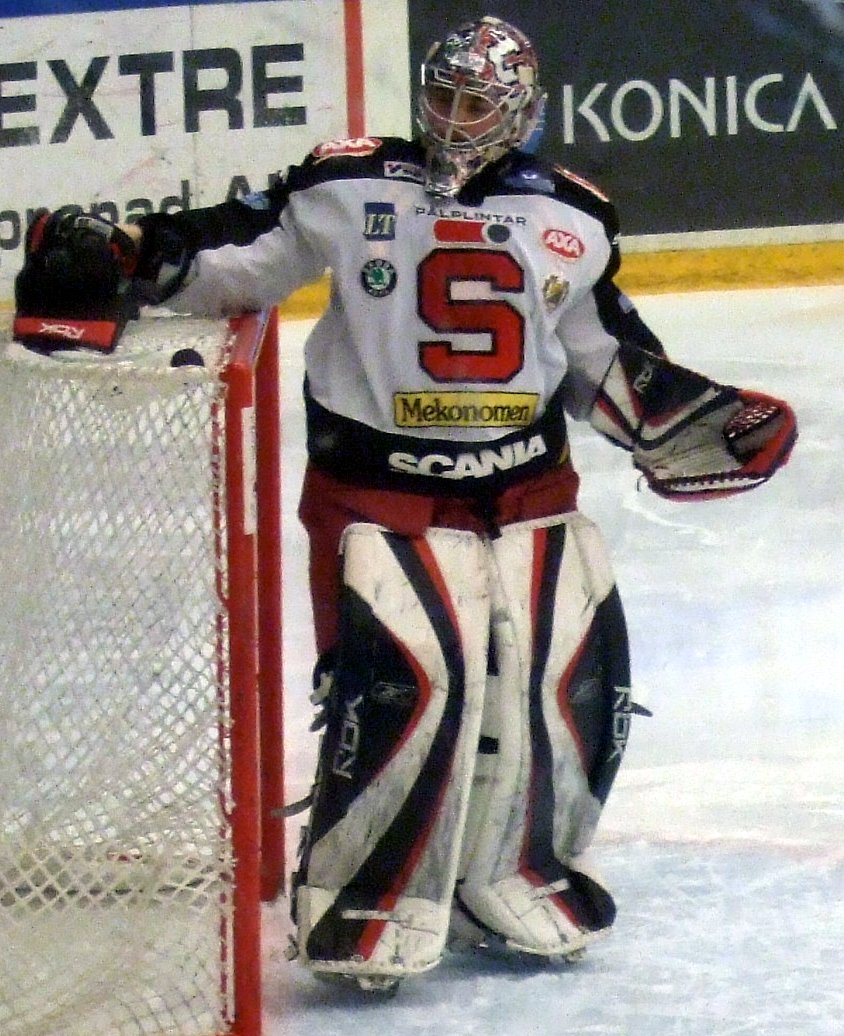 Ice hockey player Jhonas Enroth of Södertälje SK in E.ON Arena, Timrå, Sweden